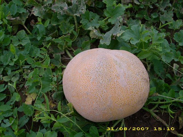 Sárgadinnye (Cucumis melo L.) a regenyei szőlőhegyen